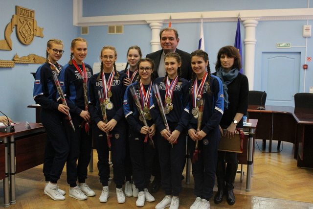 Команда по степ-аэробике "Лада Фристайл" на чествовании в администрации городского округа Тольятти